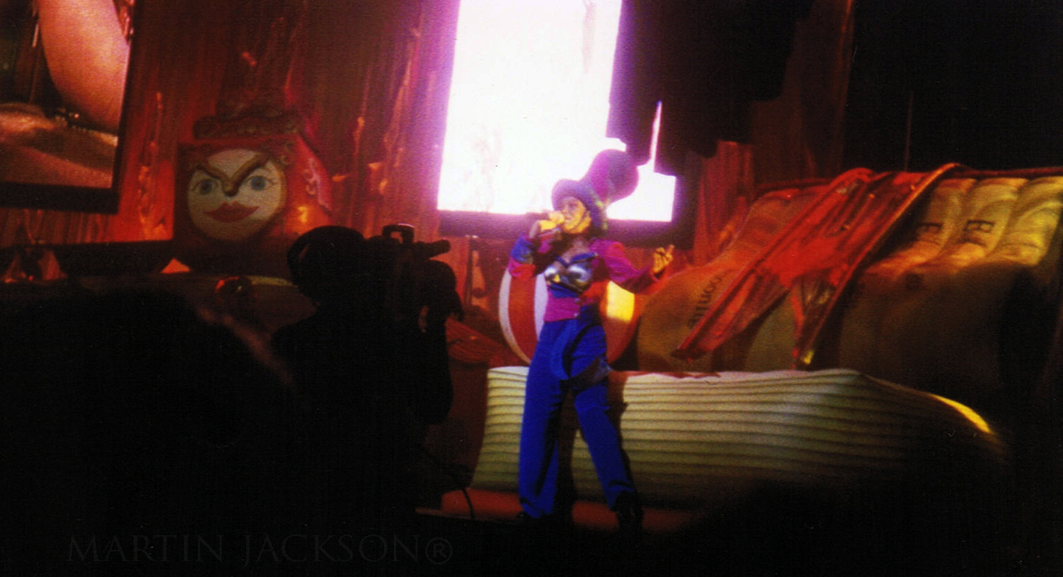 Janet Jackson mentre si esibisce nel "whimsical medley" durante il The Velvet Rope World Tour al Forum d'Assago il 5 maggio 1998